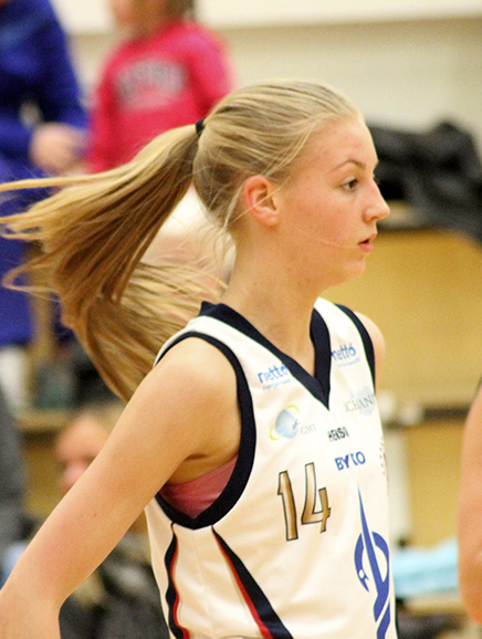 Keflavík's Emelía Ósk Gunnarsdóttir in a game against Hamar on 17 December 2014.